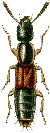 This file has been extracted from another file: Jacobs14.jpg